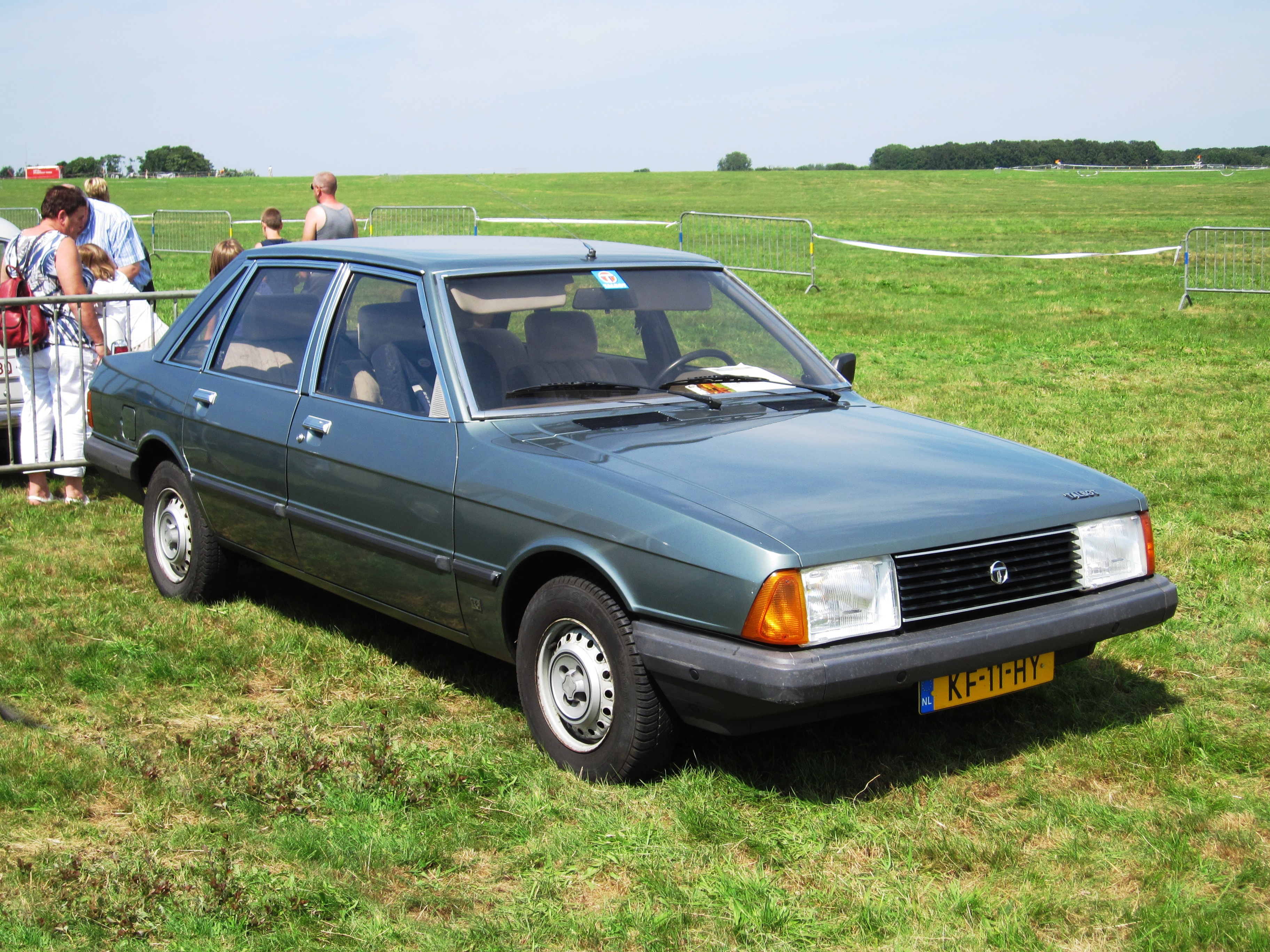 Talbot Solara GLS (1983) immatriculation NL Registered September 1983 Motor 4-cylinders